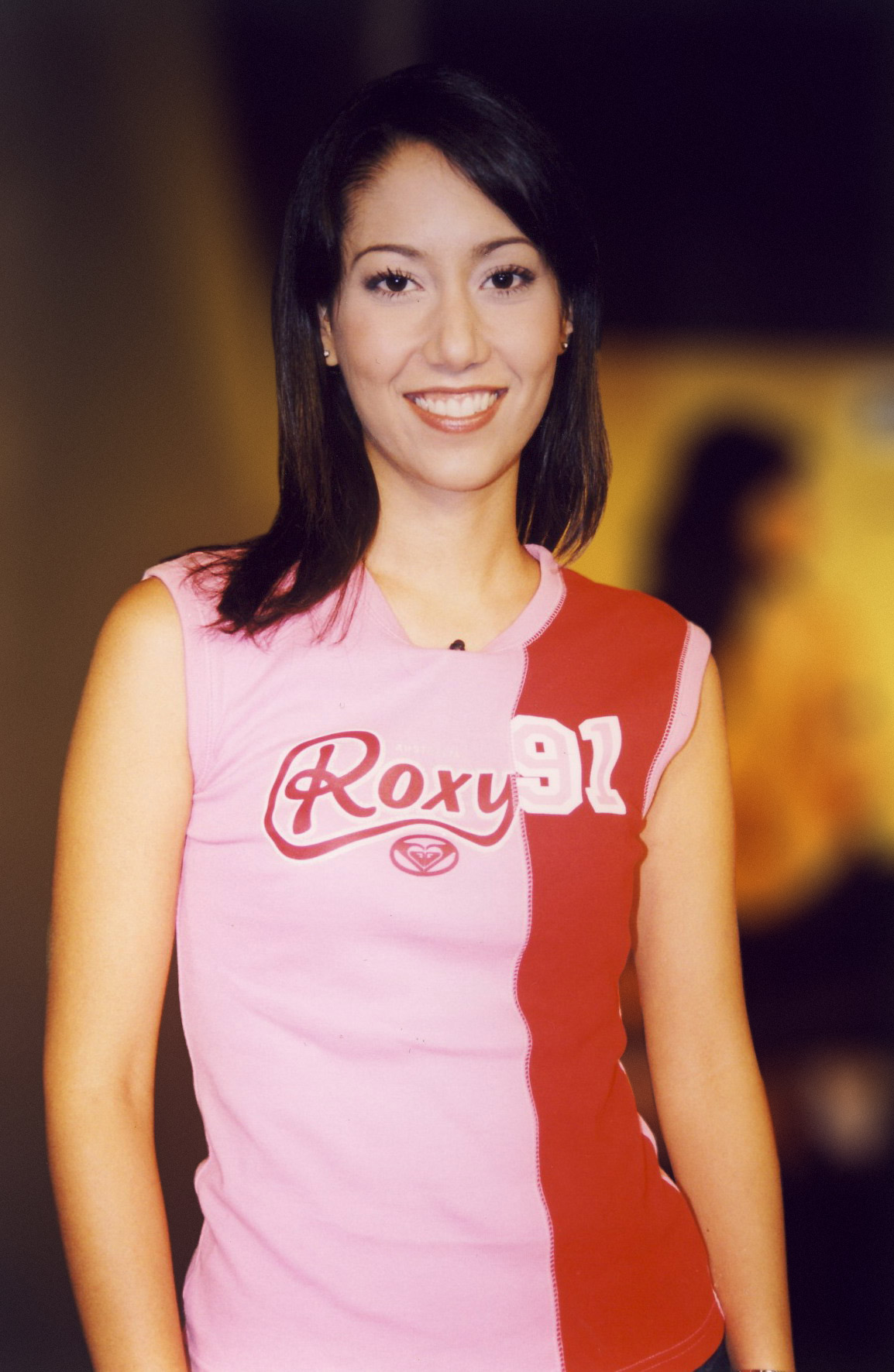 Rowena Kennett in 2002